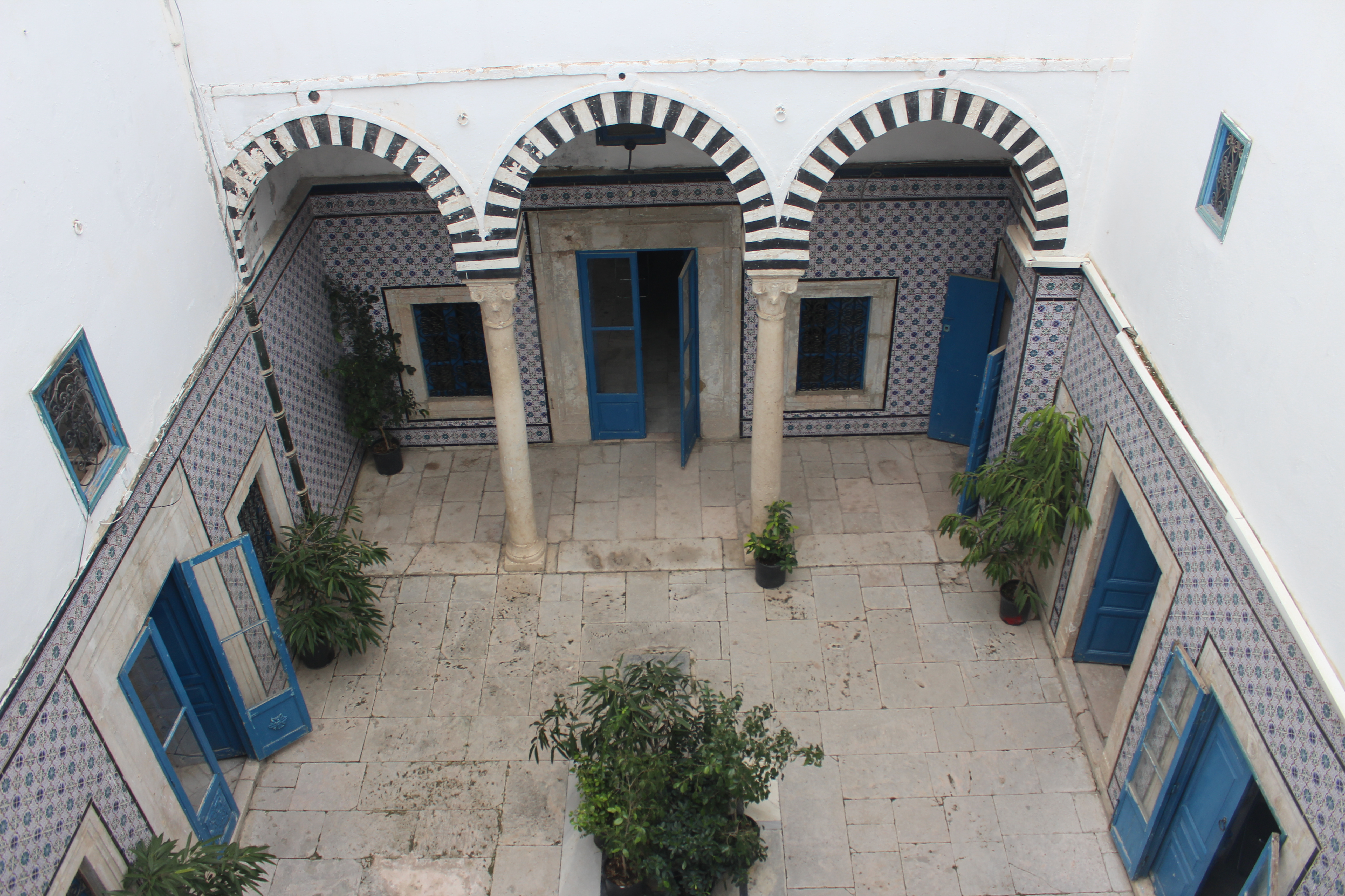 La médina de Tunis